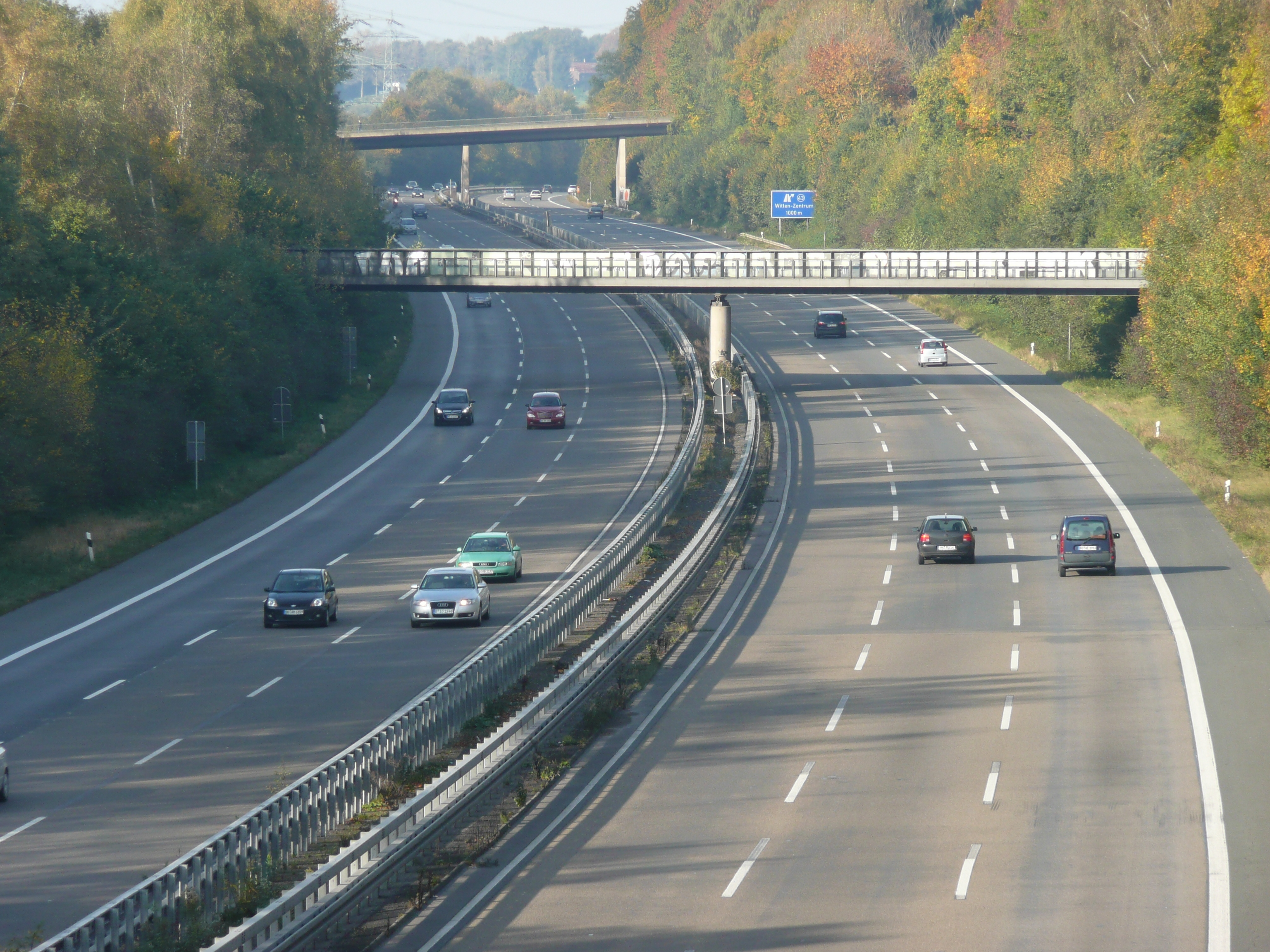 Brücke der stillgelegten Rheinischen Eisenbahn über die A448 in Witten